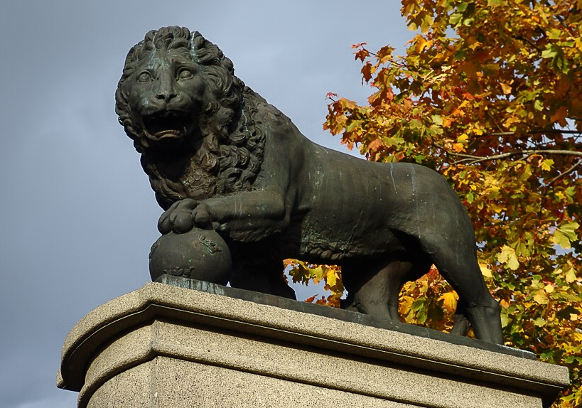 Шведский лев